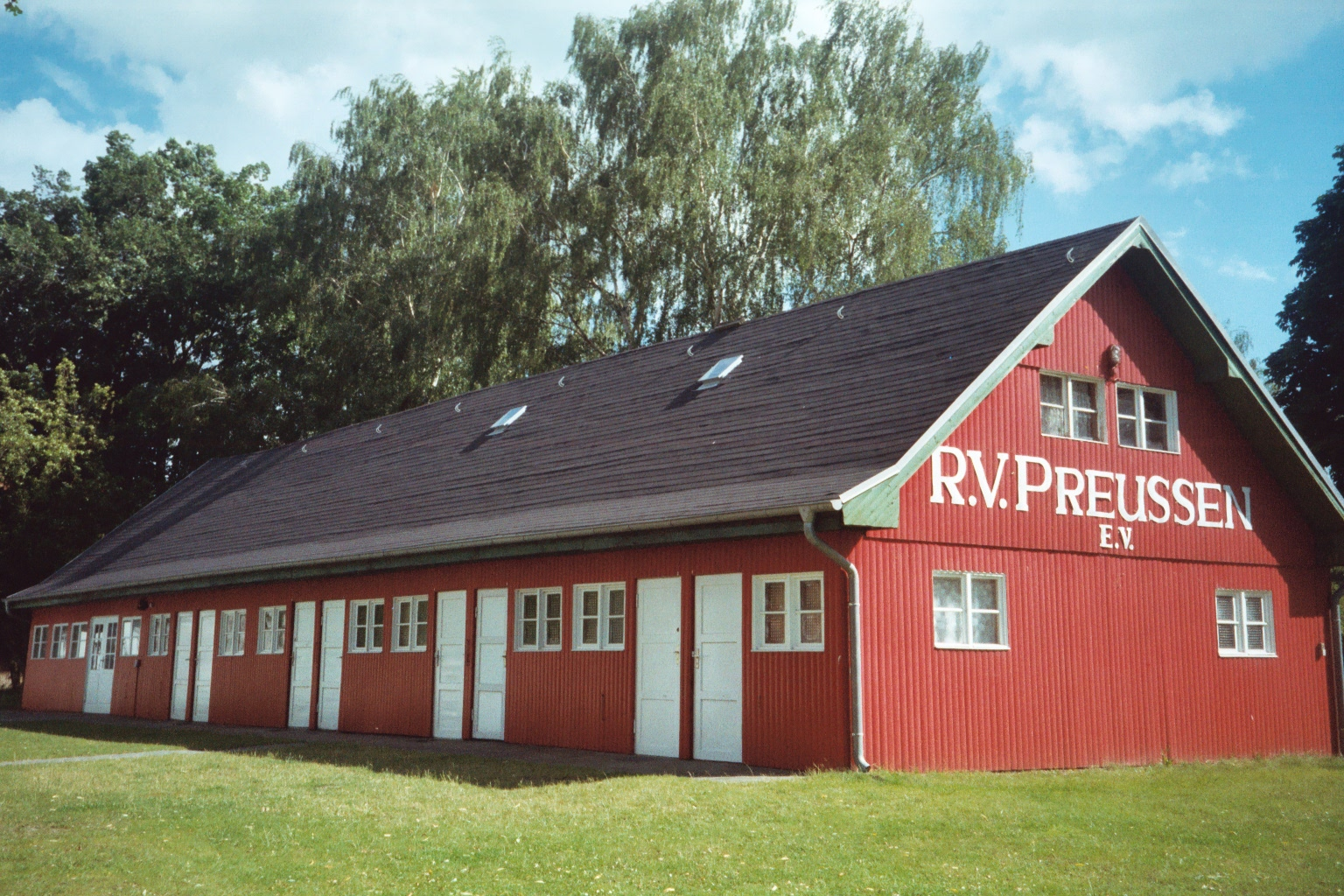 Bootshaus des Ruder-Verein "Preussen" e.V. Berlin